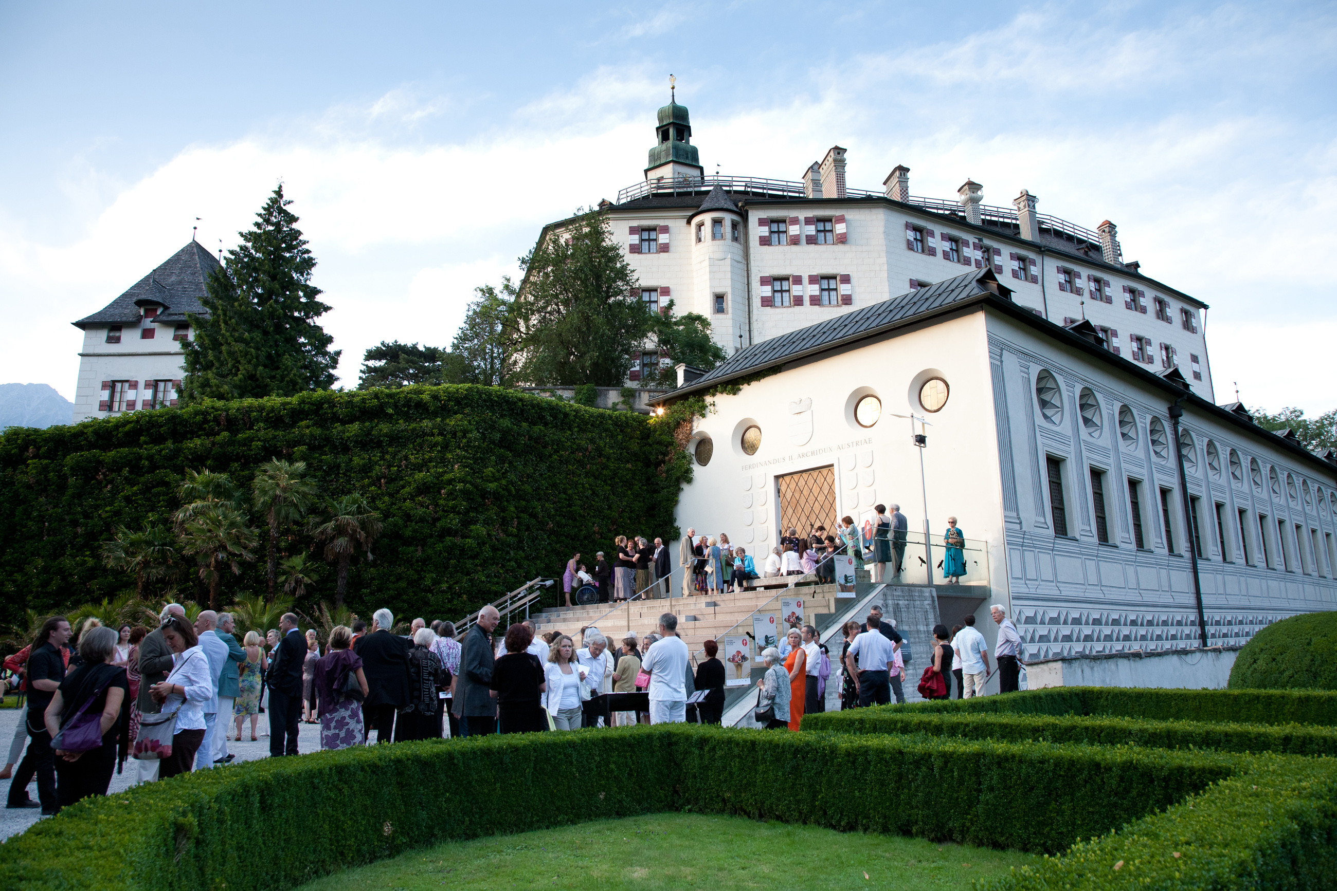 Schloss Ambras, einer der Spielstätten der Innsbrucker Festwochen.